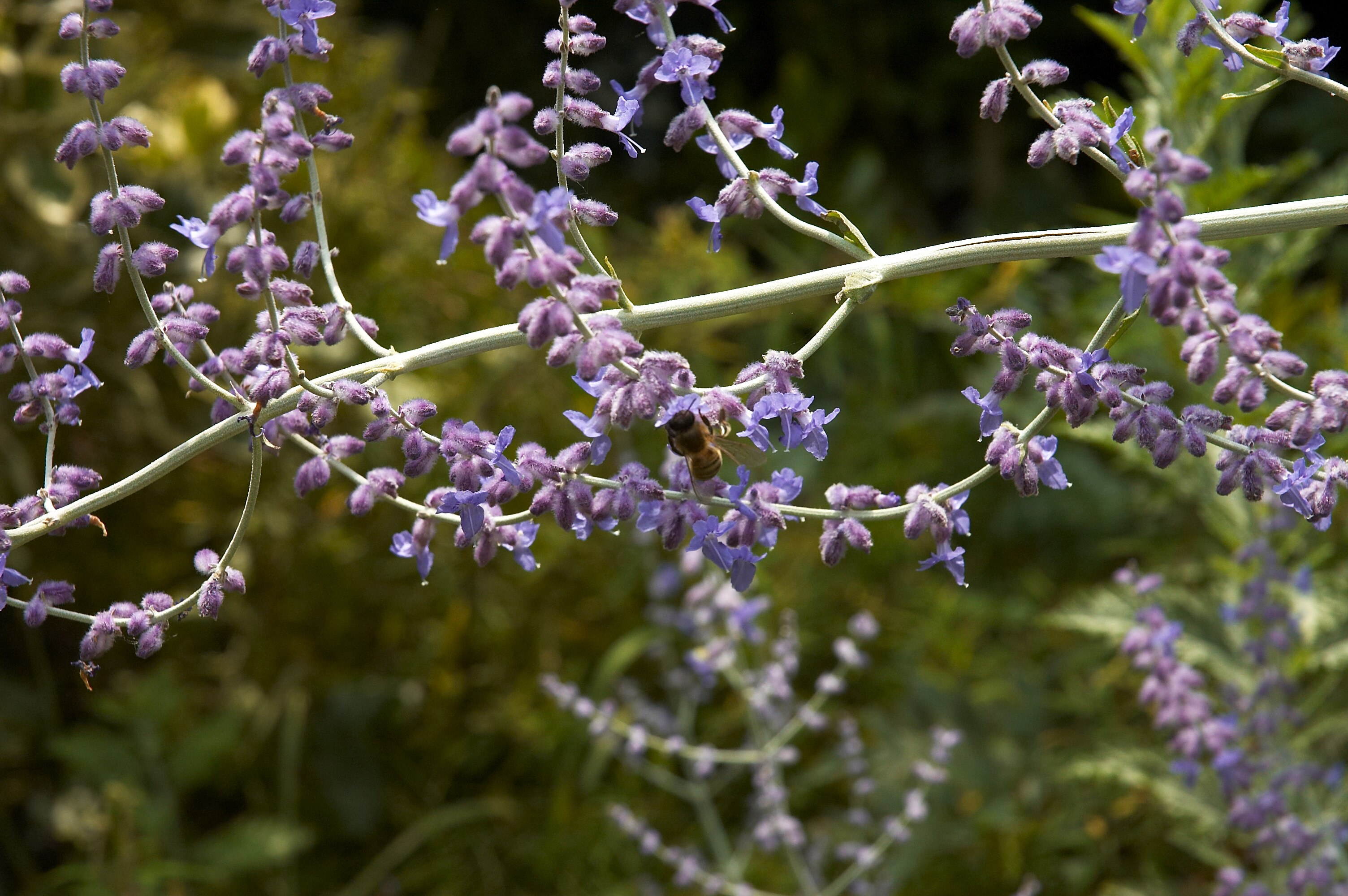 Perovskia atriplicifolia 'Blue Spire'